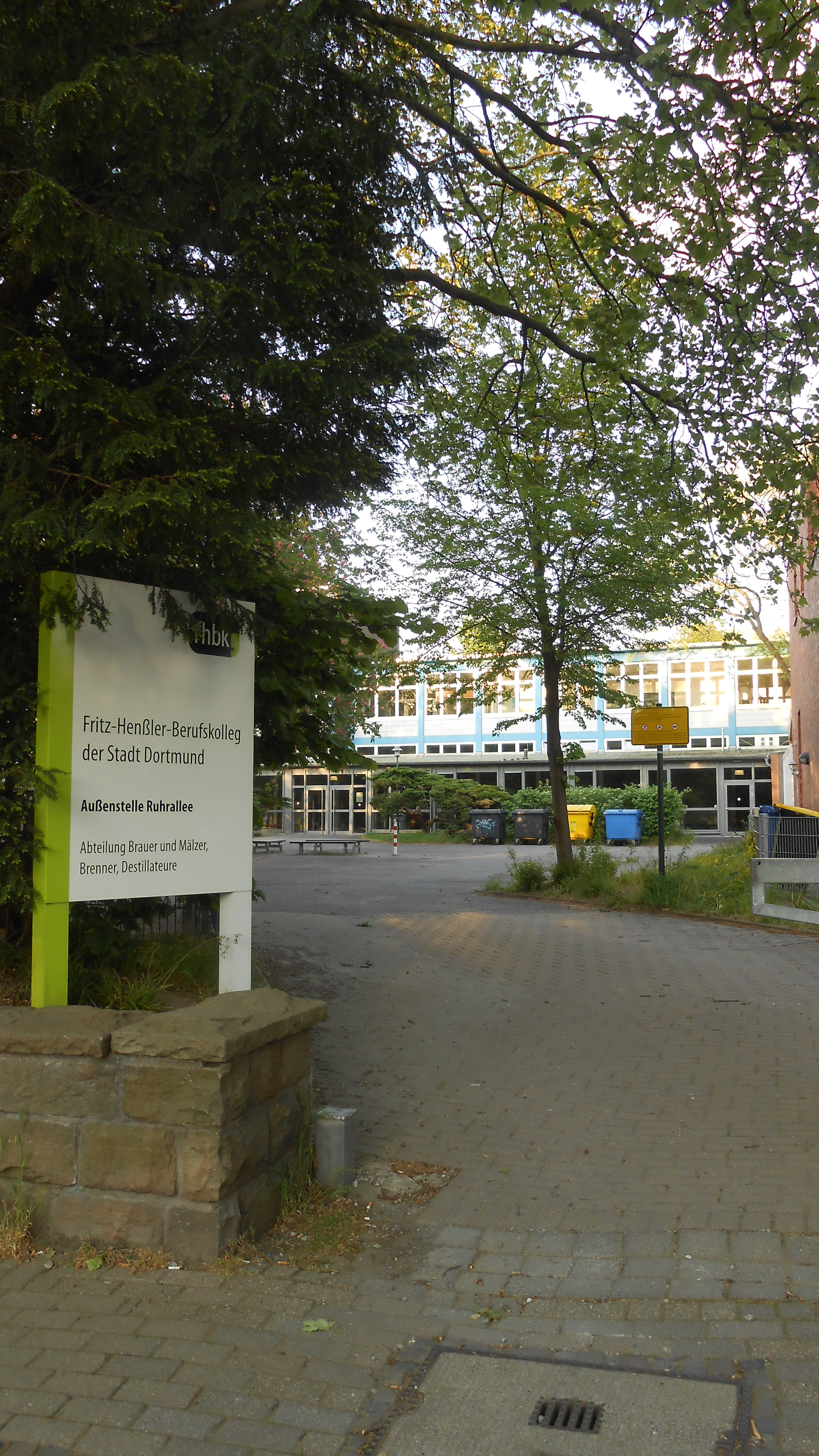 Die Außenstelle des Fritz-Henßler-Berufskollegs an der Ruhralle, in der südlichen Dortmunder Innenstadt.